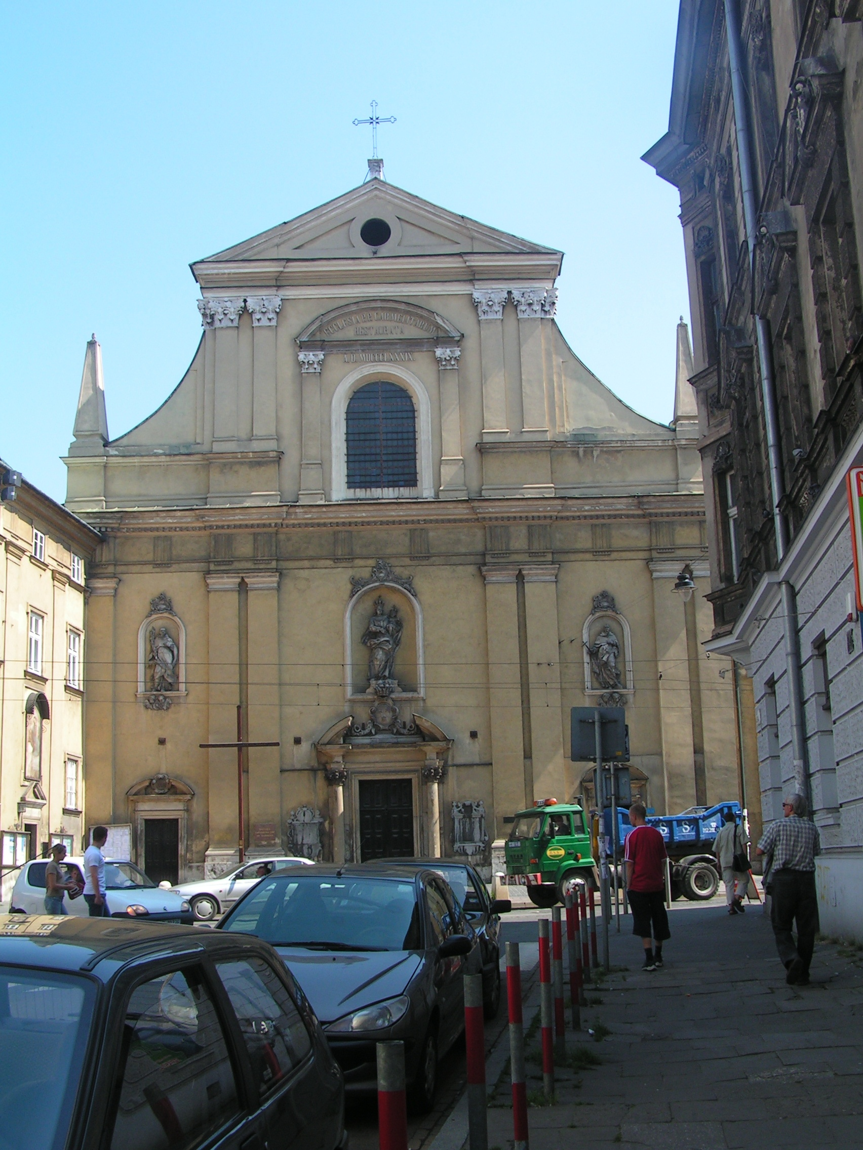 Kościół Nawiedzenia Najświętszej Maryi Panny w Krakowie (karmelitów)